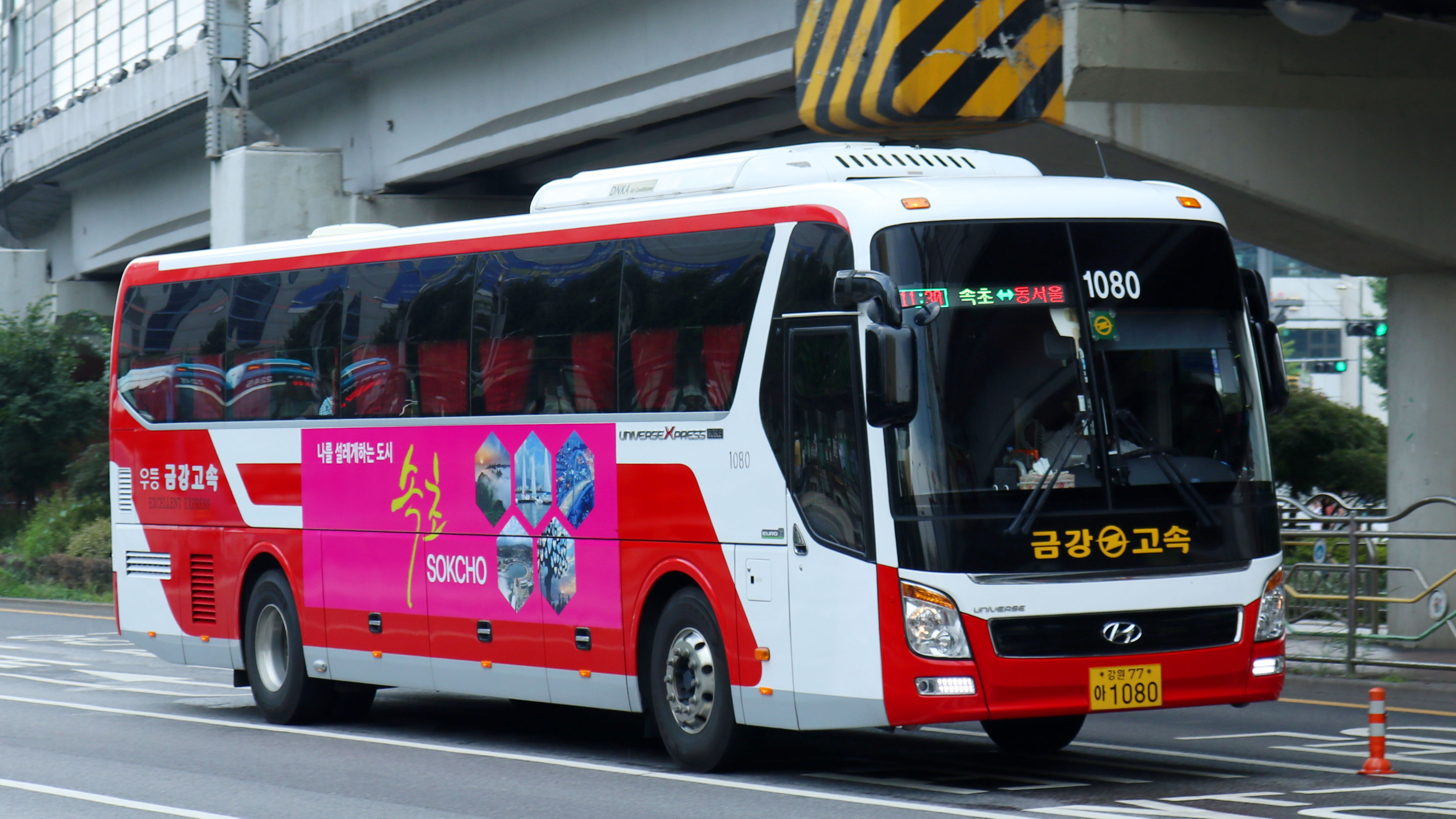 금강고속 뉴 프리미엄 익스프레스 노블 유로6